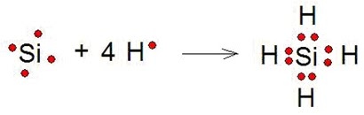 reacción del átomo de Silicio con 4 átomos y 2 de silicio se transforman en cationes de Hidrógeno